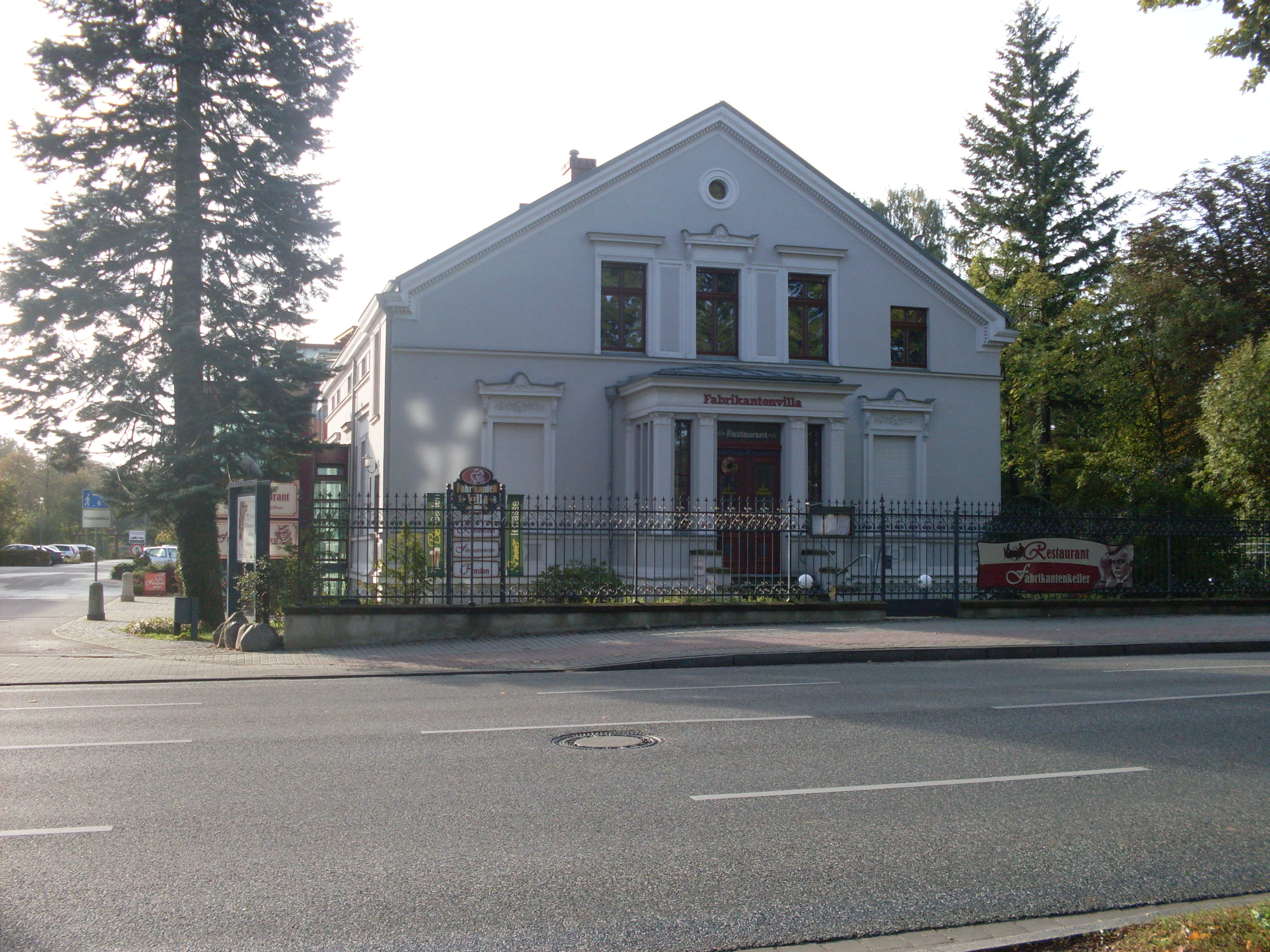 Fabrikantenvilla1